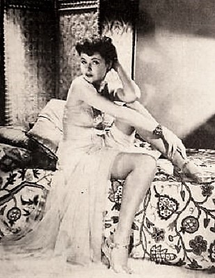 Kay Aldridge